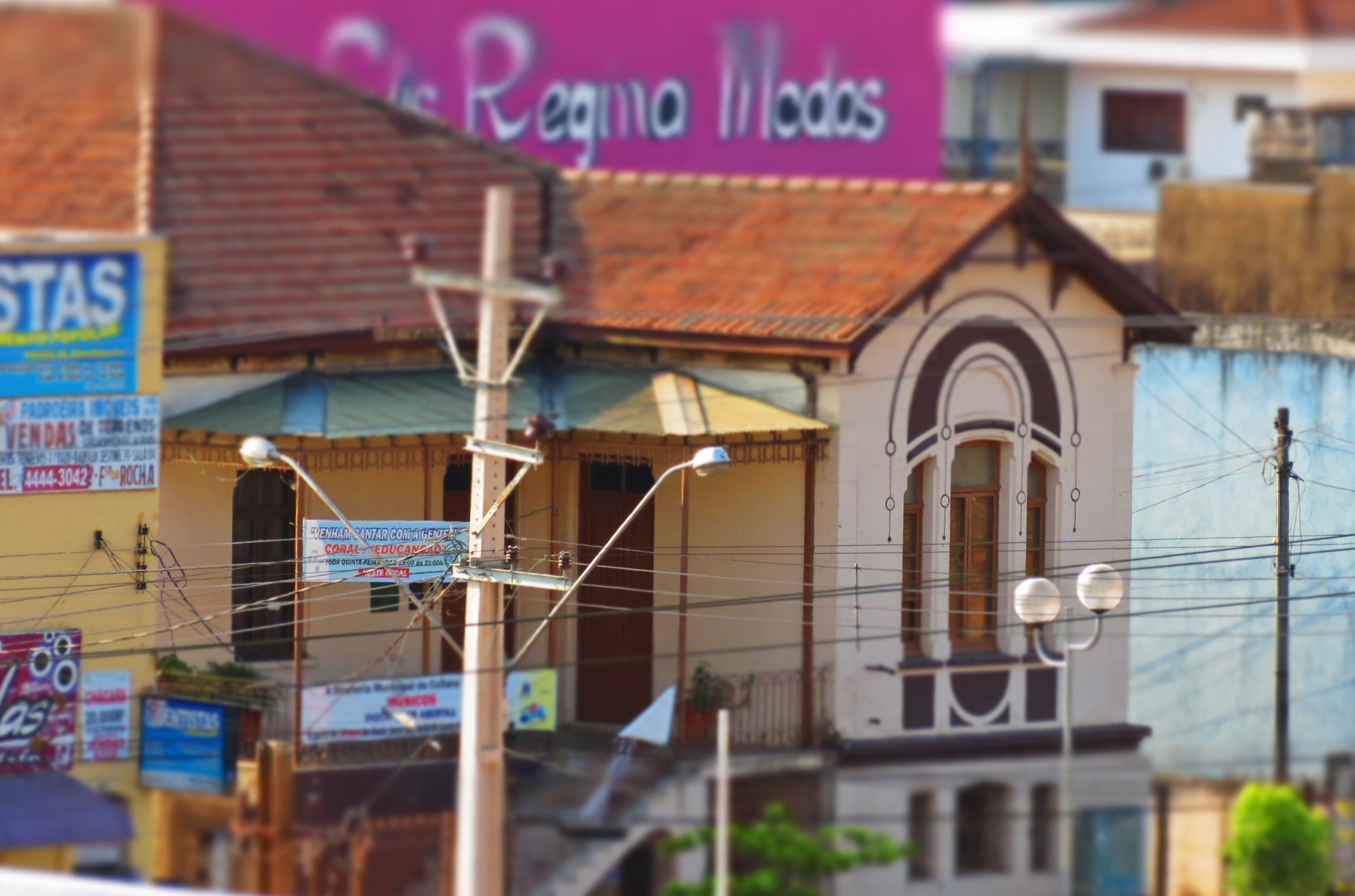 Biblioteca municipal de Franco da Rocha